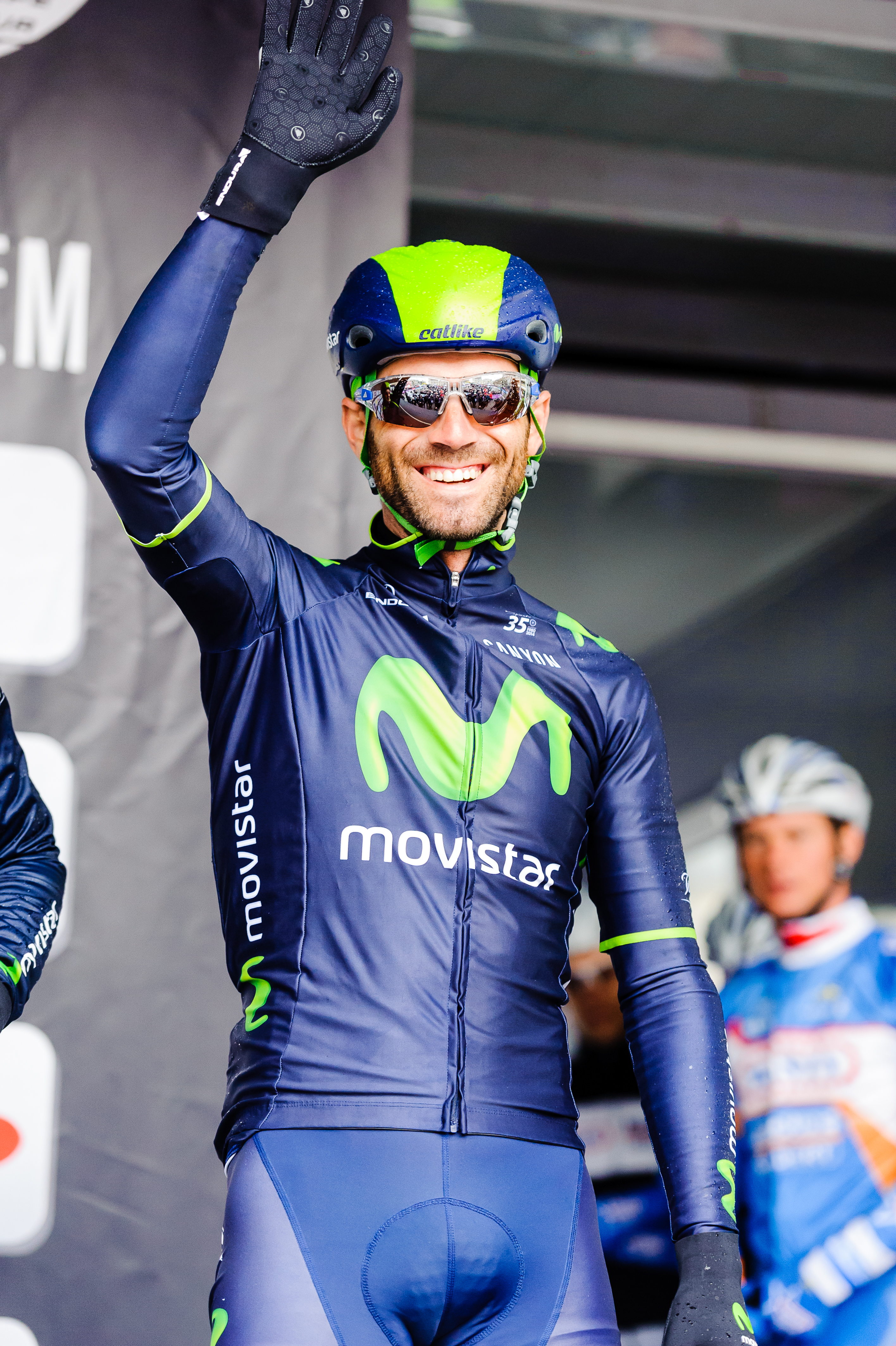 Valverde groet het publiek voor de start van Dwars door Vlaanderen 2014. De Spanjaard wil zich voorbereiden op de kasseirit tussen Ieper en Arenberg in de Tour enkele maanden later. Hij eindigt als 36ste in het peloton.